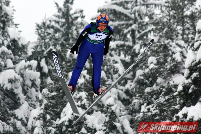 l'italiana Simona Senoner in gara durante la tappa di Villaco della Coppa Continentale di salto con gli sci, nel febbraio 2010